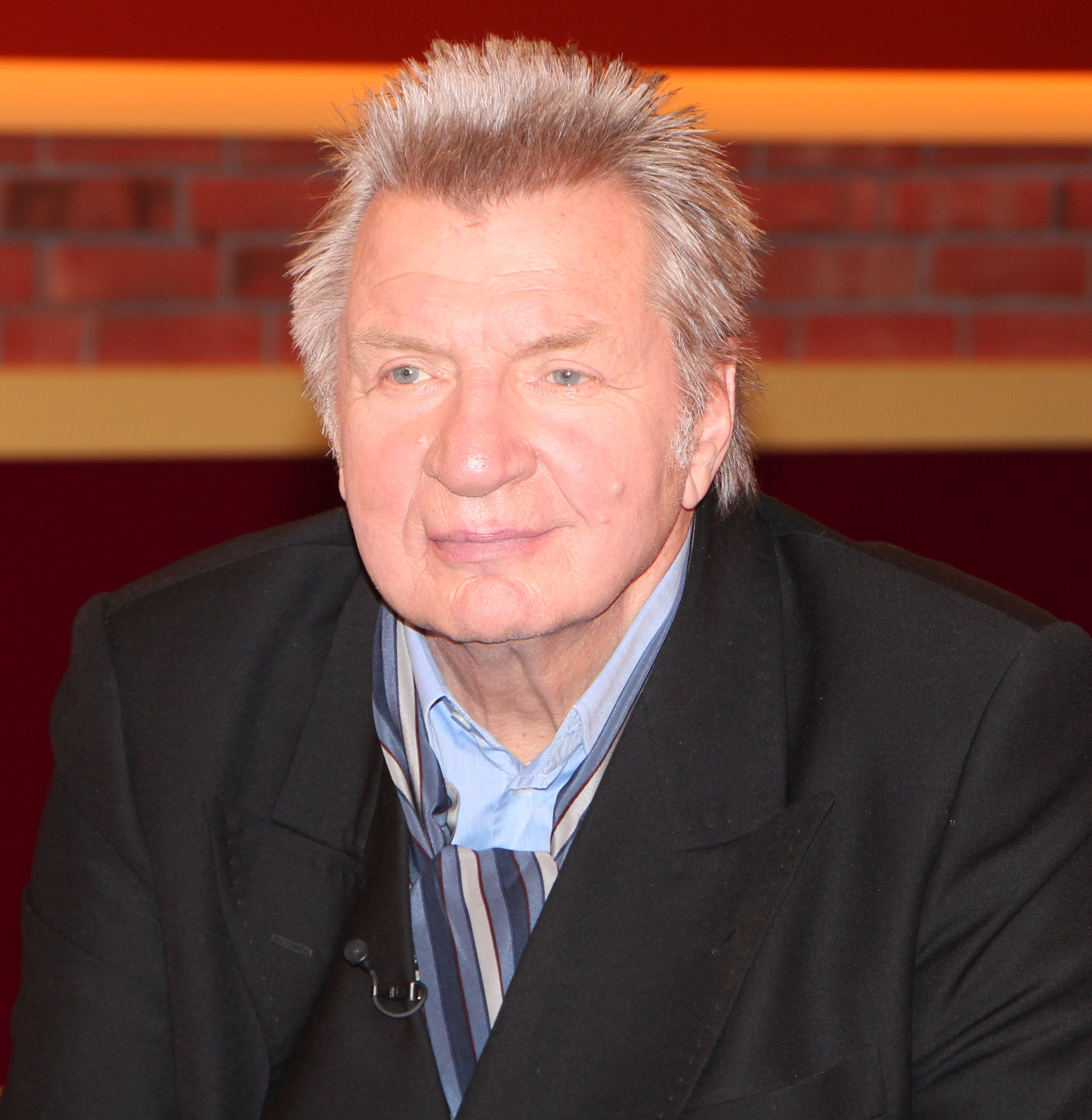 Werner Schneyder (* 25. Januar 1937 in Graz) ist ein österreichischer Kabarettist, Autor, Schauspieler, Regisseur und Sportkommentator.